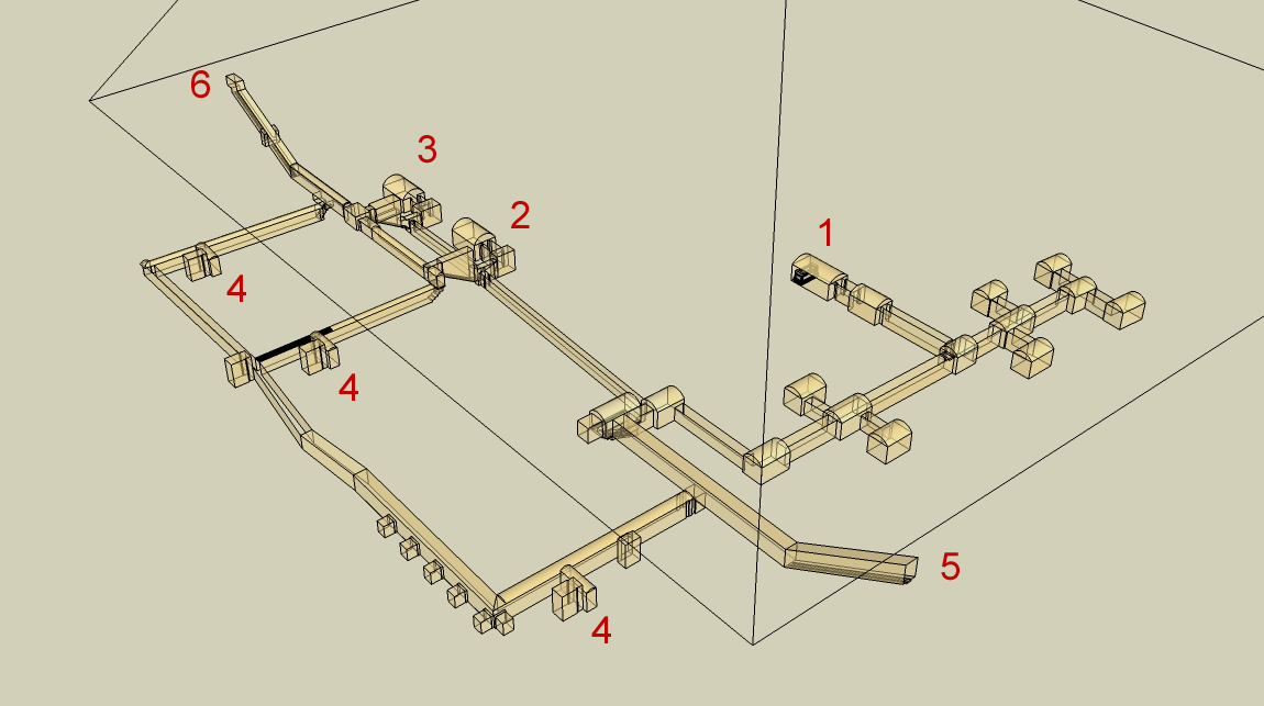 restitution du complexe funéraire d'amenemhat III à Dahchour, appartements funéraires Substruktur der Amenemhet-III.-Pyramide in Dahschur